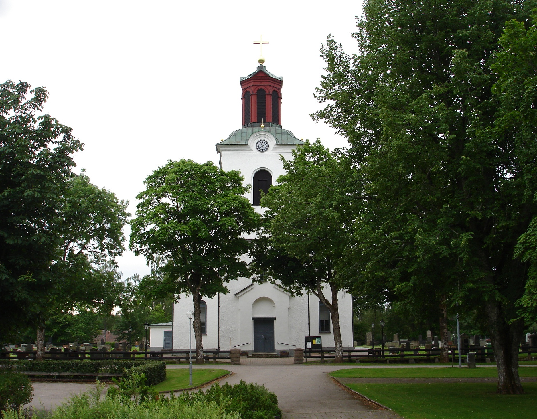 Traryds kyrka, sydvästra Kronobergs län i Markaryds kommun